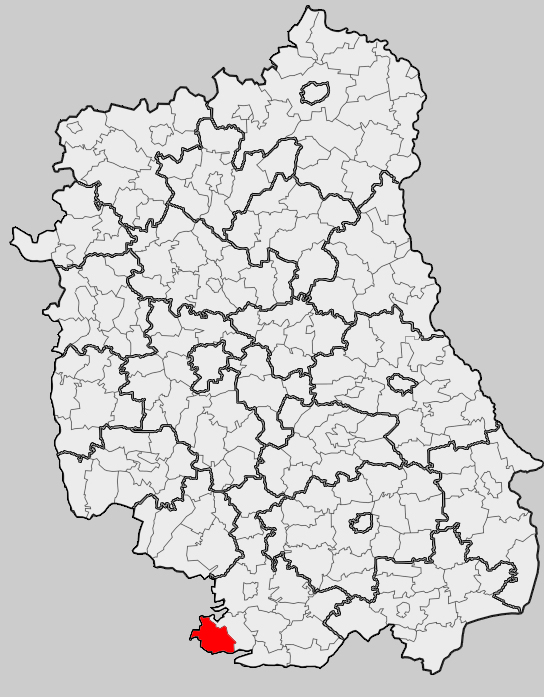 Map of gmina Potok Górny, Biłgoraj county, Lublin voivodship Mapa gminy Potok Górny, powiat biłgorajski, województwo lubelskie